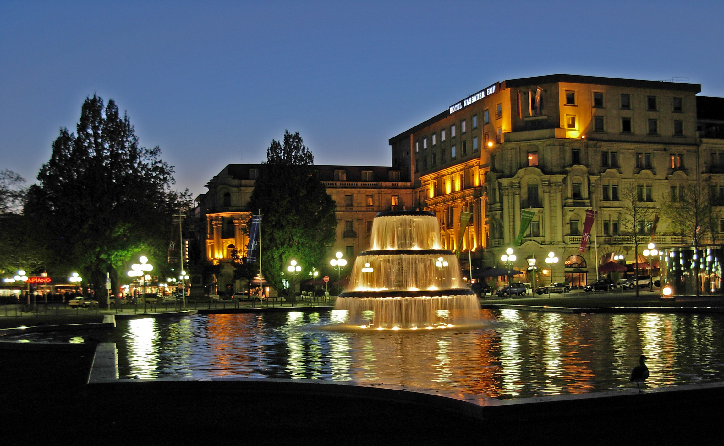 Hotel Nassauer Hof an der Wilhelmstraße, im Vordergrund ein Kaskadenbrunnen auf dem Bowling Green